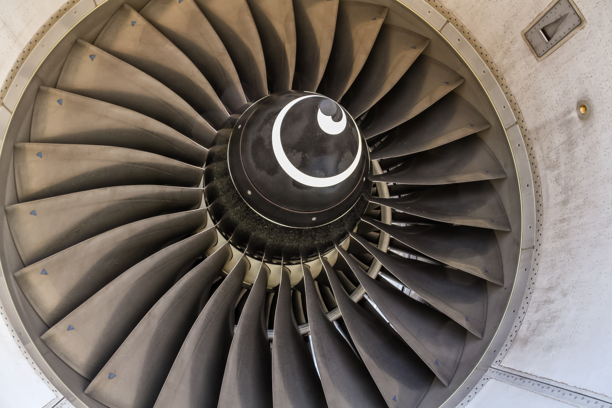 V5-ANO Air Namibia Airbus A330-243 @ Frankfurt Rhein-Main International (FRA / EDDF) / 02.09.2016